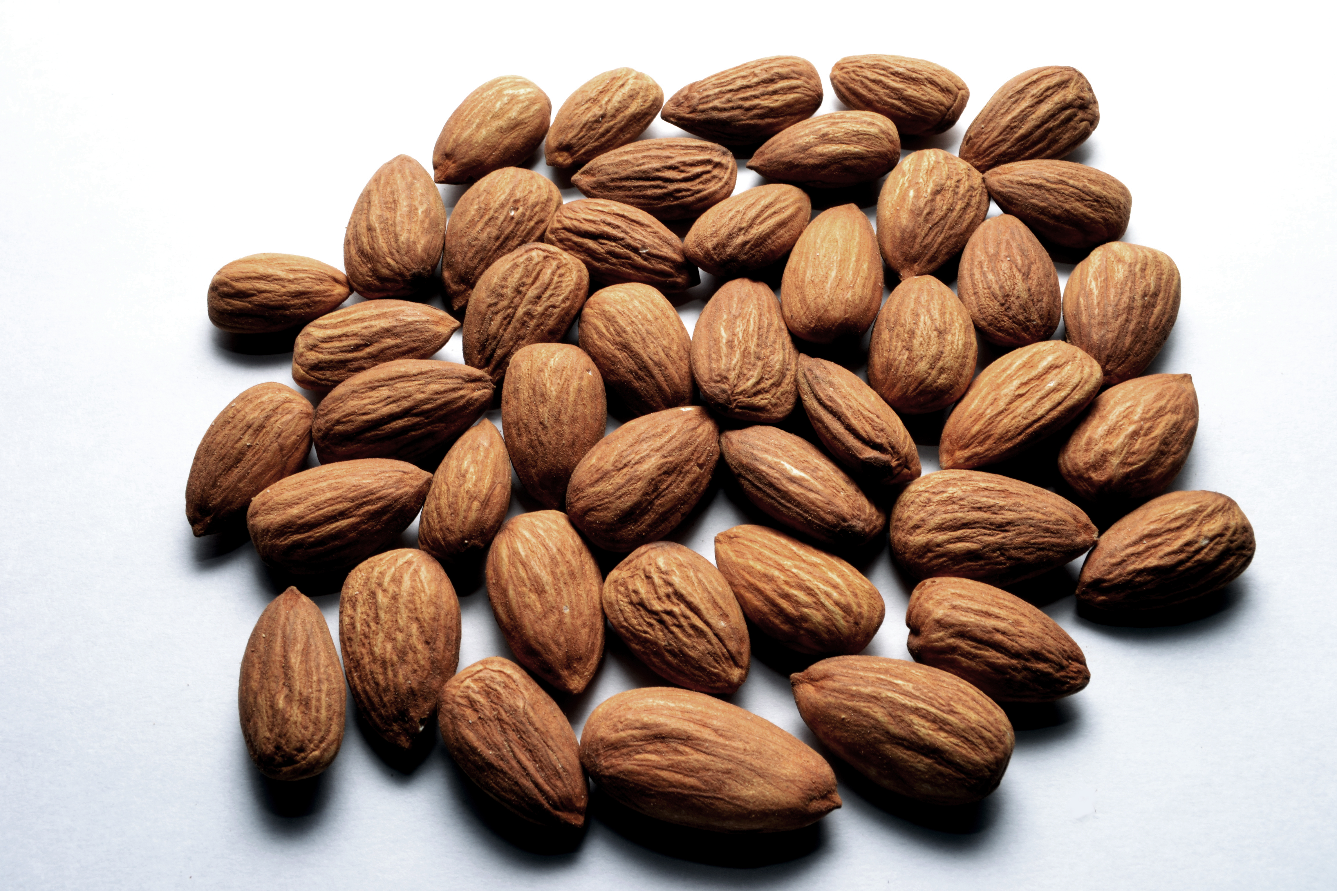 പ്രൂണസ് ജനുസ്സിൽപെട്ട ഒരു മരമാണ്‌ ബദാം (Almond). ഇതിന്റെ പരിപ്പ് ഭക്ഷ്യയോഗ്യവും വളരെയധികം പോഷക മൂല്യമുള്ളതുമാണ്. നാലുമുതൽ പത്തുവരെ മീറ്റർ ഉയരം വയ്ക്കുന്ന ഈ ഇലപൊഴിയും മരത്തിന്റെ തടിയ്ക്ക് 30 സെന്റീമീറ്റർ വരെ വ്യാസമുണ്ടാകും. മധ്യേഷ്യയിലാണ്‌ ഈ മരത്തിന്റെ ഉദ്ഭവം. മനുഷ്യർ പിന്നീട് വടക്കേ ആഫ്രിക്ക, യൂറോപ്പ് മുതലായ മറ്റു സ്ഥലങ്ങളിലേക്ക് ഇതിനെ കൊണ്ടുപോകുകയായിരുന്നു. ഭക്ഷിക്കാനുപയോഗിക്കുന്നതിനു പുറമെ ഇതിന്റെ പരിപ്പിൽ നിന്ന് എണ്ണയും നിർമ്മിക്കാറുണ്ട്. ജമ്മു-കശ്മീർ സംസ്ഥാനത്തിന്റെ ഔദ്യോഗിക വൃക്ഷമാണ്‌ ബദാം.